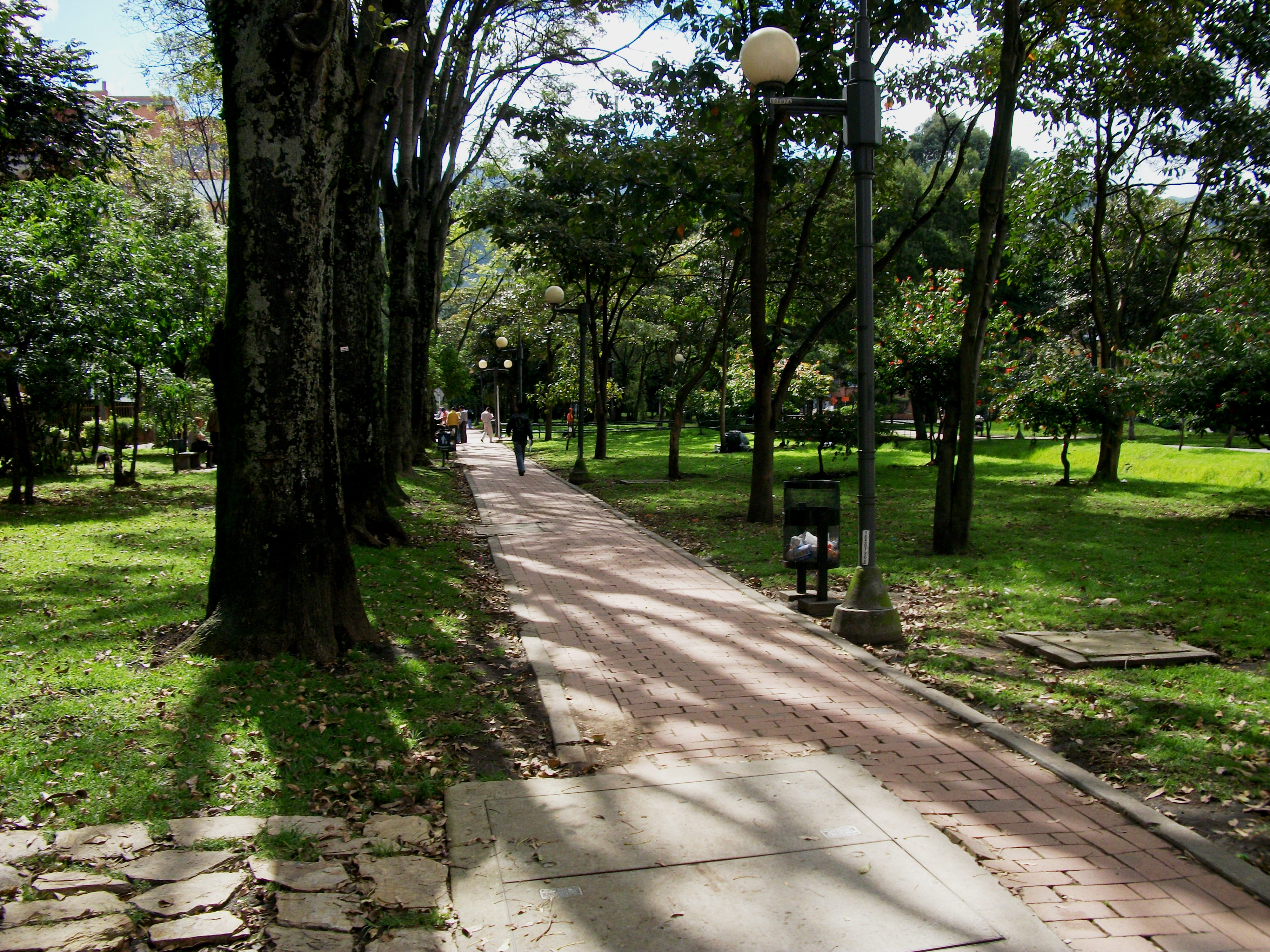 PArque El Virrey, hacia la carrera 15. Bogotá. Colombia.